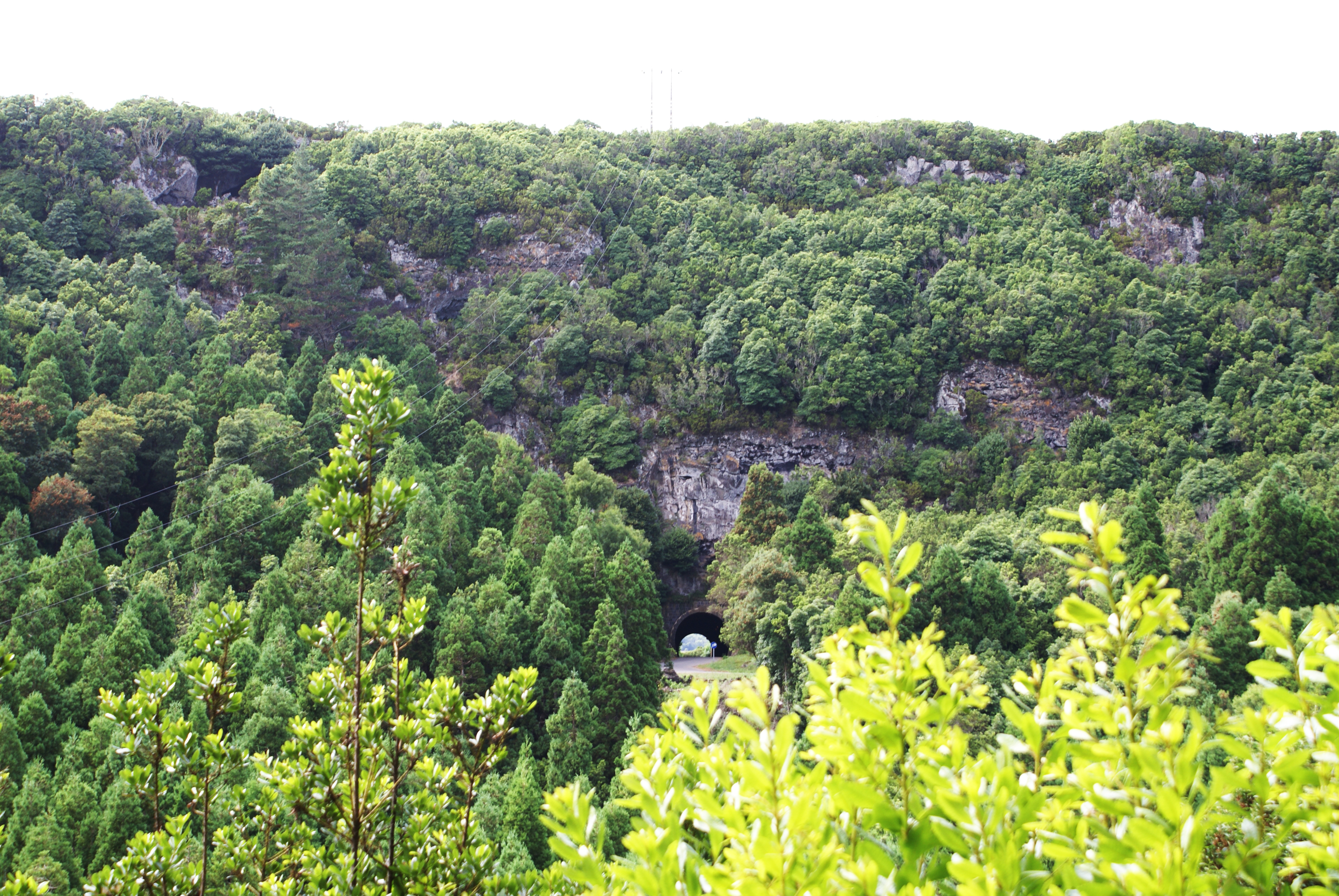 Caldeira da Graciosa, vista do Miradouro 1, Santa Cruz da Graciosa, Açores, Portugal